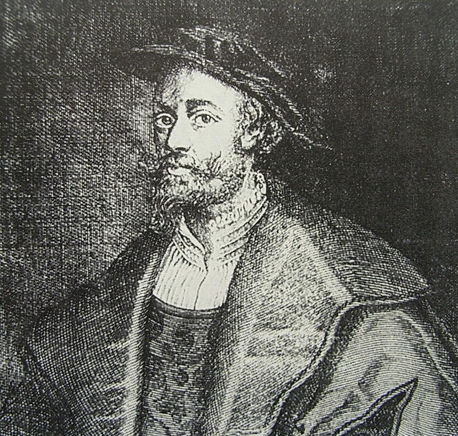 Herzog Christoph der Starke (der Kämpfer), gestorben 1493